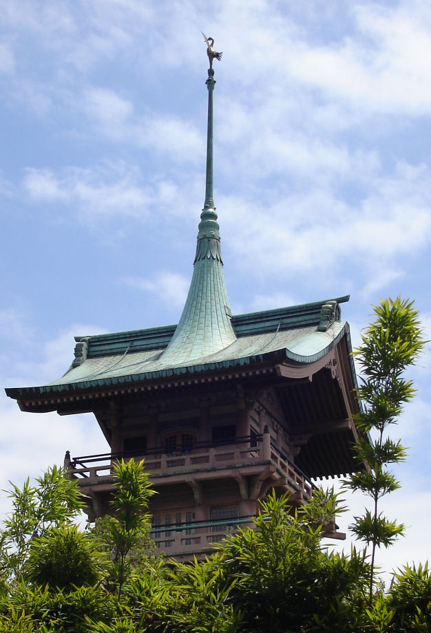 投稿者撮影